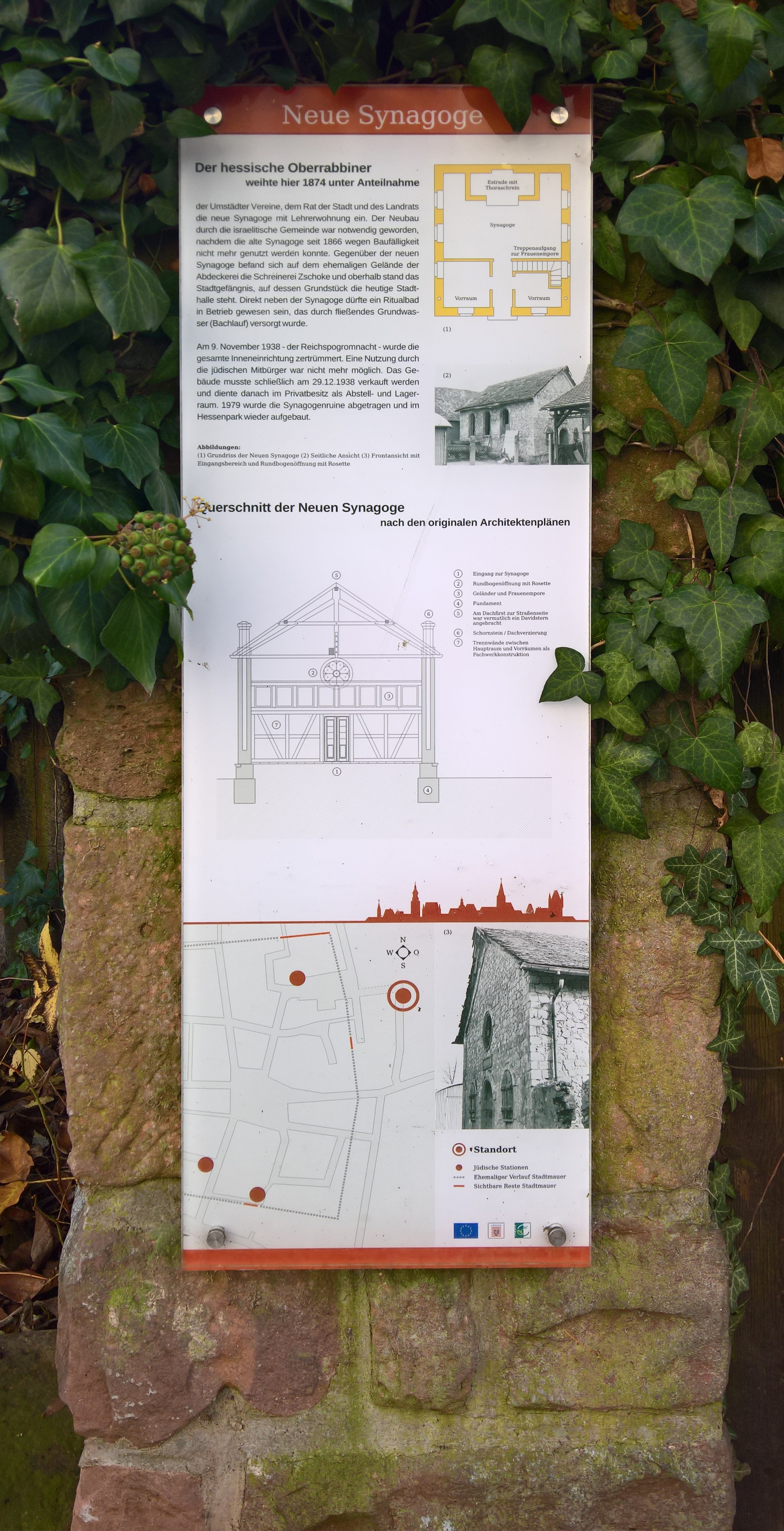 Die Informationstafel der Stadt Groß-Umstadt zur Neuen Synagoge am alten Standort in Groß-Umstadt (diese befindet sich heute im Hessenpark)